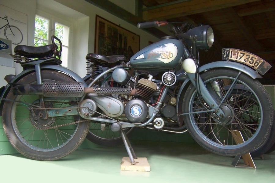 Motorrad Ahoi der Fa. Phänomen